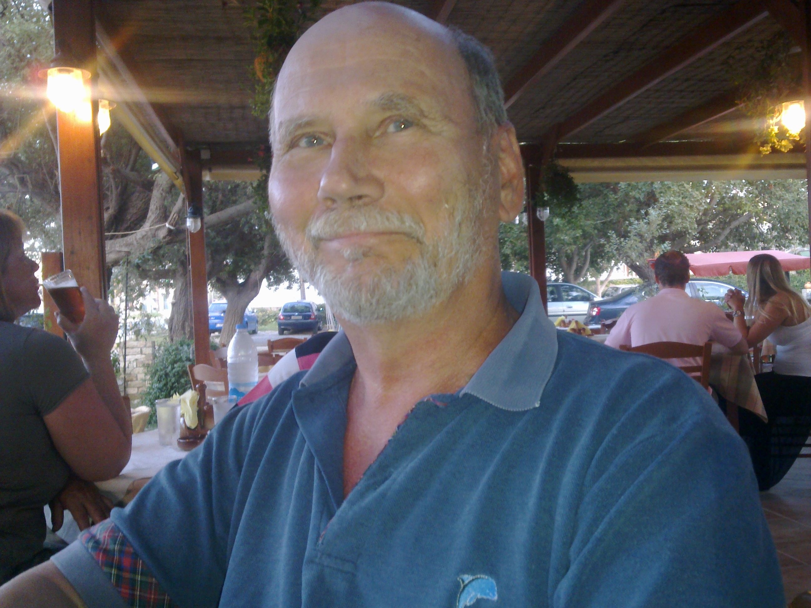 Kreetalla v. 2013